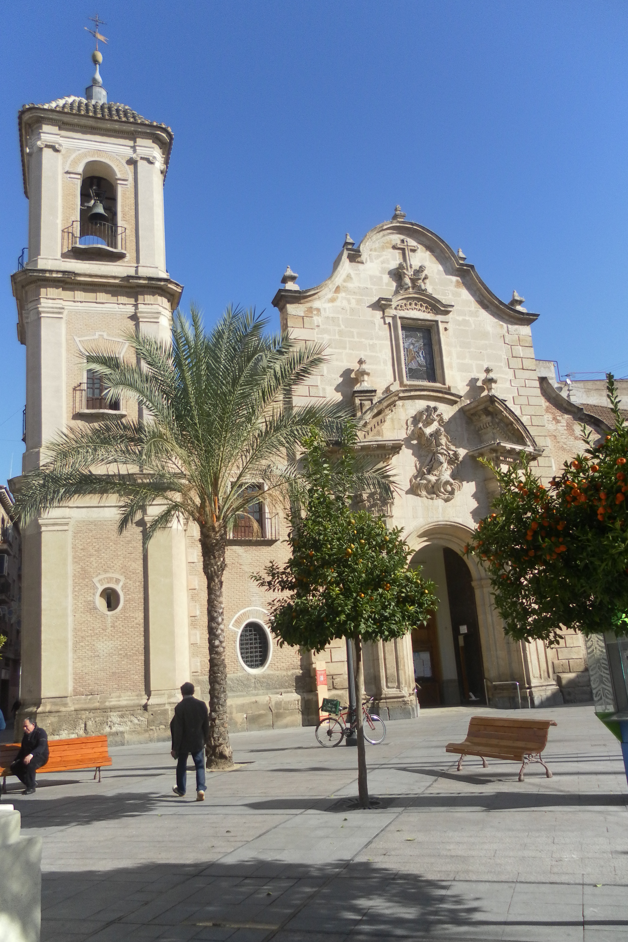 Iglesia de Santa Eulalia de Murcia (España). Edificada en el siglo XVIII en estilo barroco-rococó